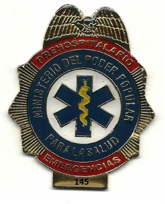 placa de funcionario paramedico registrado del Ministerio de salud